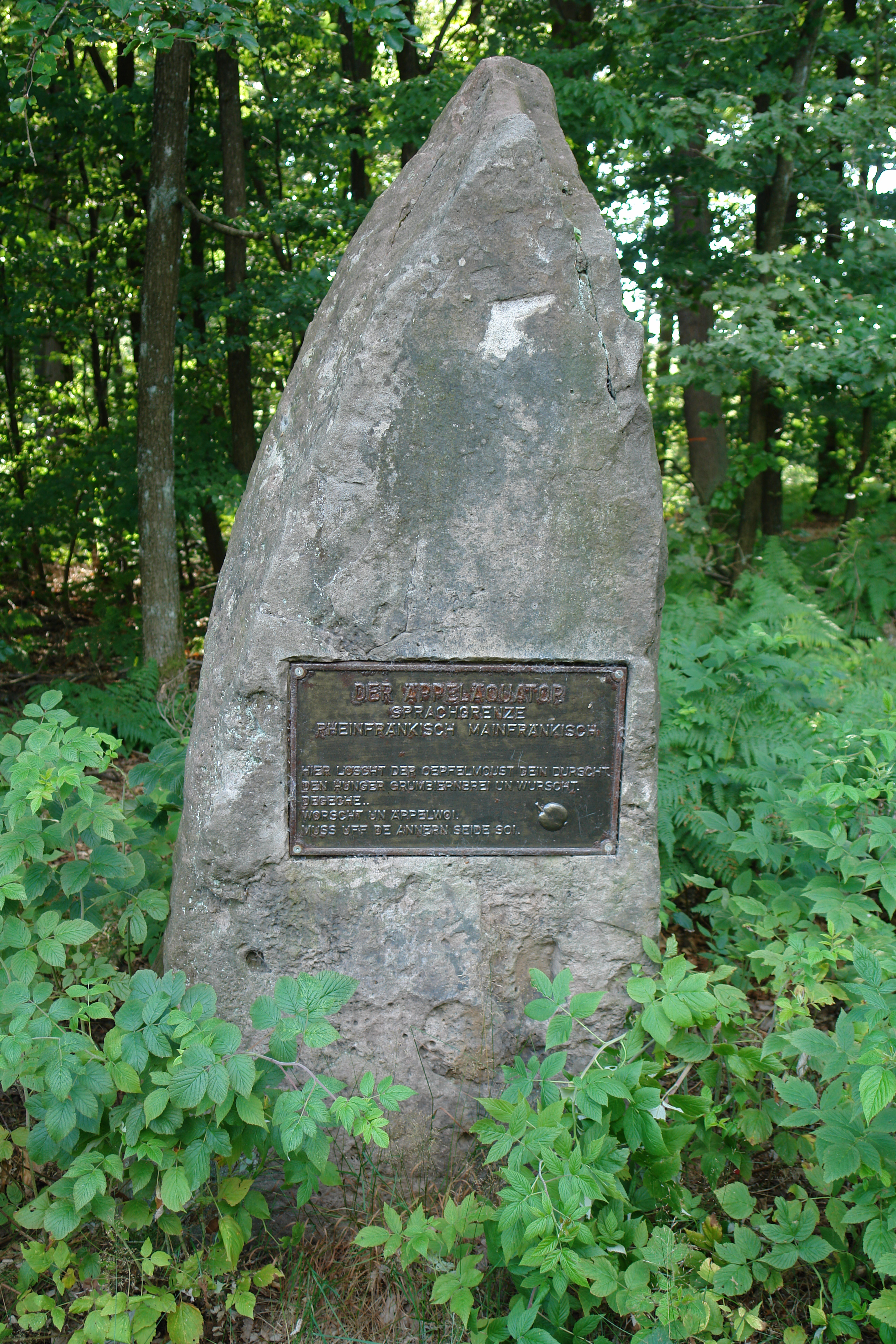 Der Äppeläquator: Sprachgrenze Rheinfränkisch-Mainfränkisch. "Hier löscht der Oepfelmoust Dein Durscht, den Hunger Grumbiernbrei un Wurscht. Degeche… Worscht un Äppelwoi, muss uff de annern Seide soi."